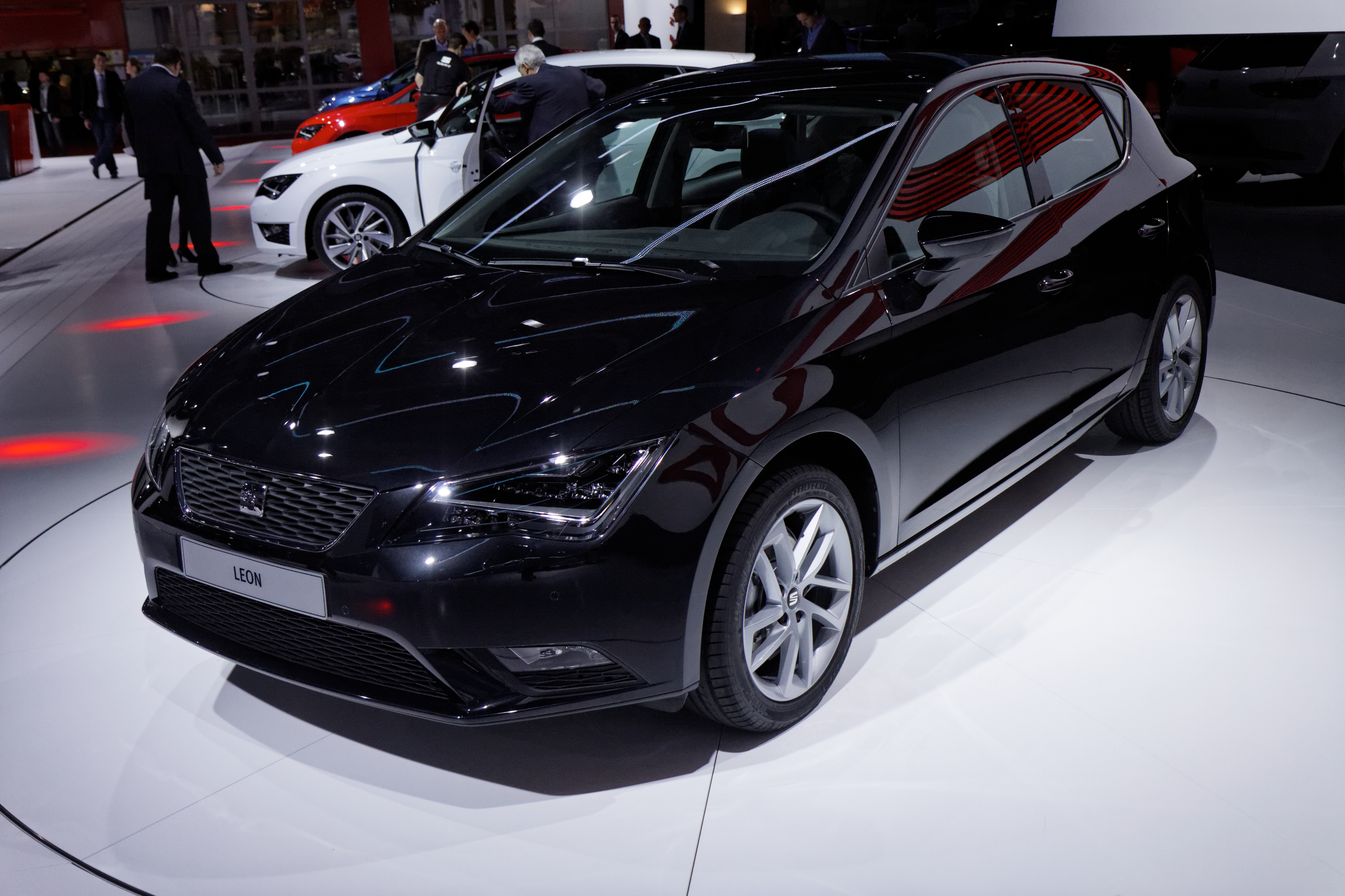 Une Seat Leon présentée lors du Mondial de l'Automobile de Paris 2012.